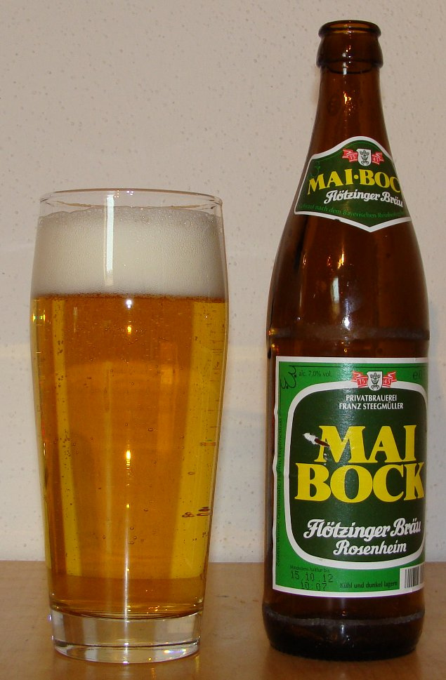 Floetzinger Maibock